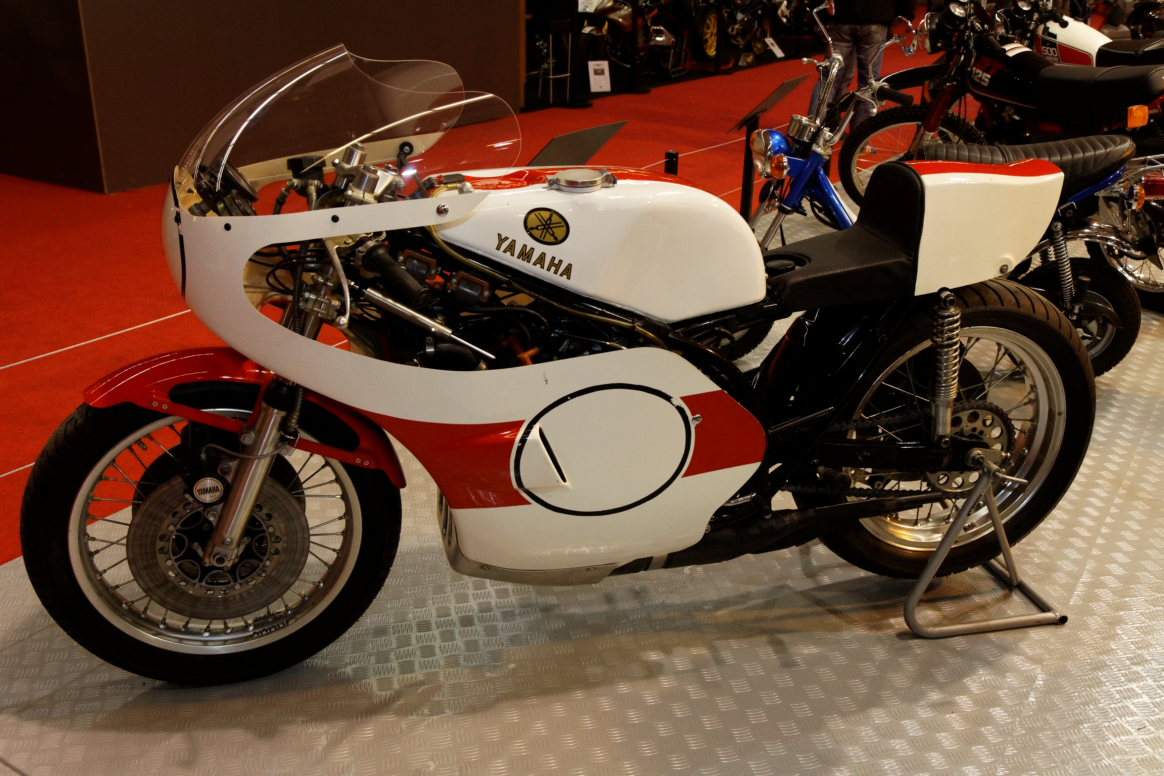 Yamaha - TZ 750 OW31